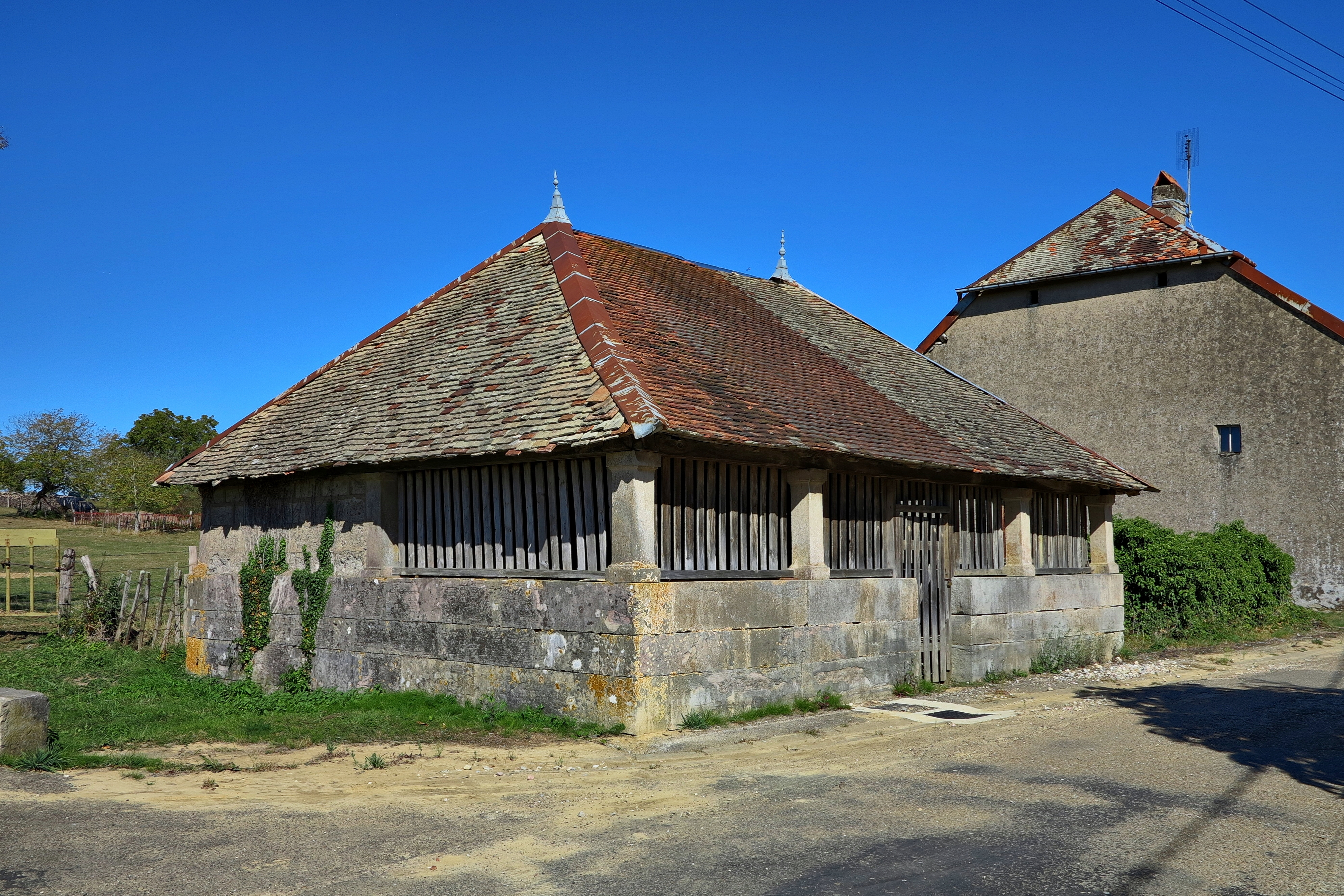 Le lavoir d'Etrelles .